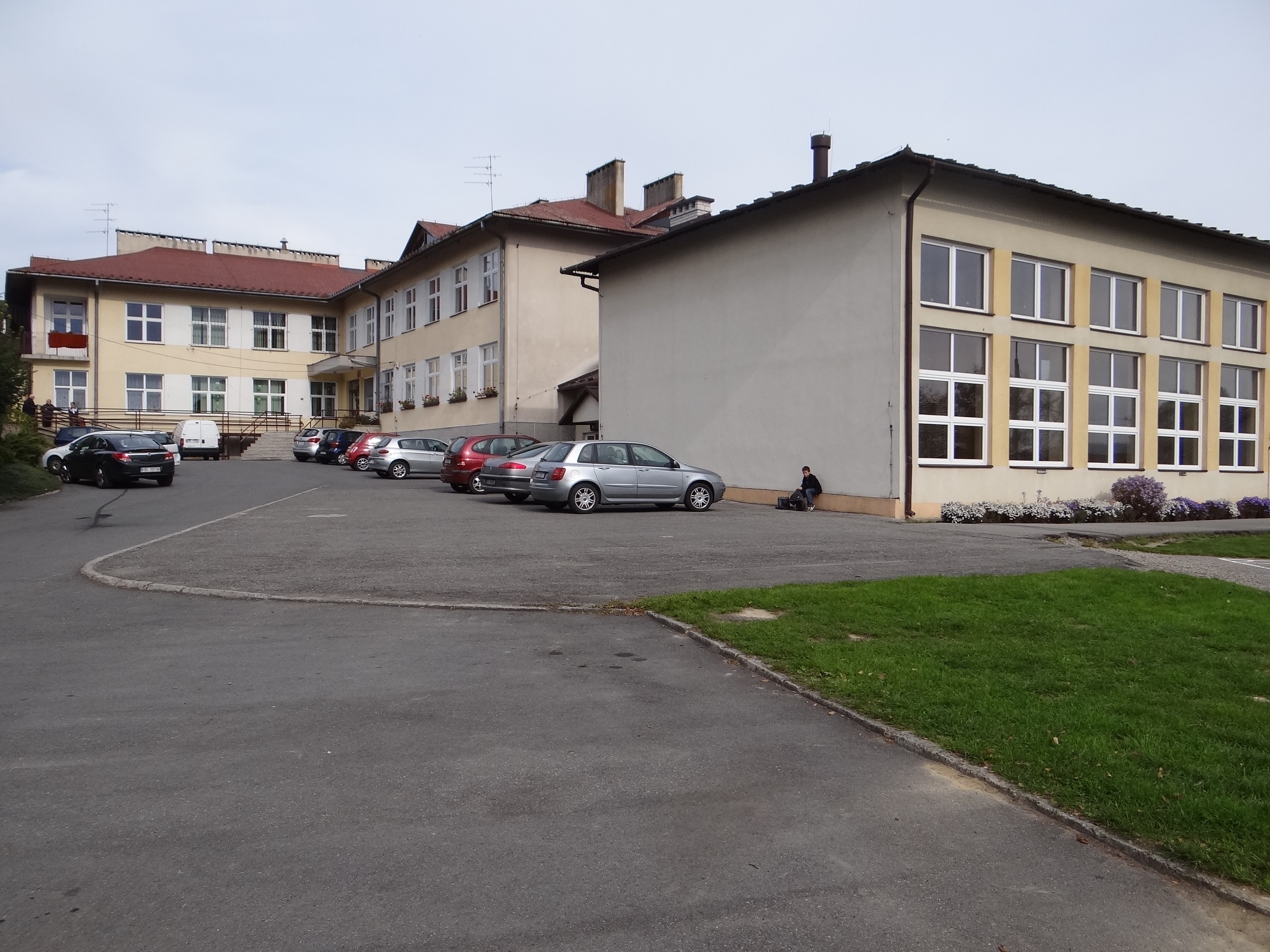 Zespół Szkół Gminnych im. Lotników Polskich w Nieszkowicach Wielkich